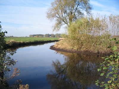 Bildbeschreibung: Die Sorge bei Haberland Quelle: selbst fotografiert Fotograf/Zeichner: Flussmensch / Jürgen Clausen Datum: Oktober 2005 Sonstiges